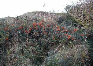 Hippophae rhamnoides